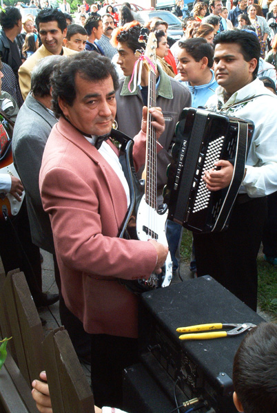 Romští hudebníci v Brně